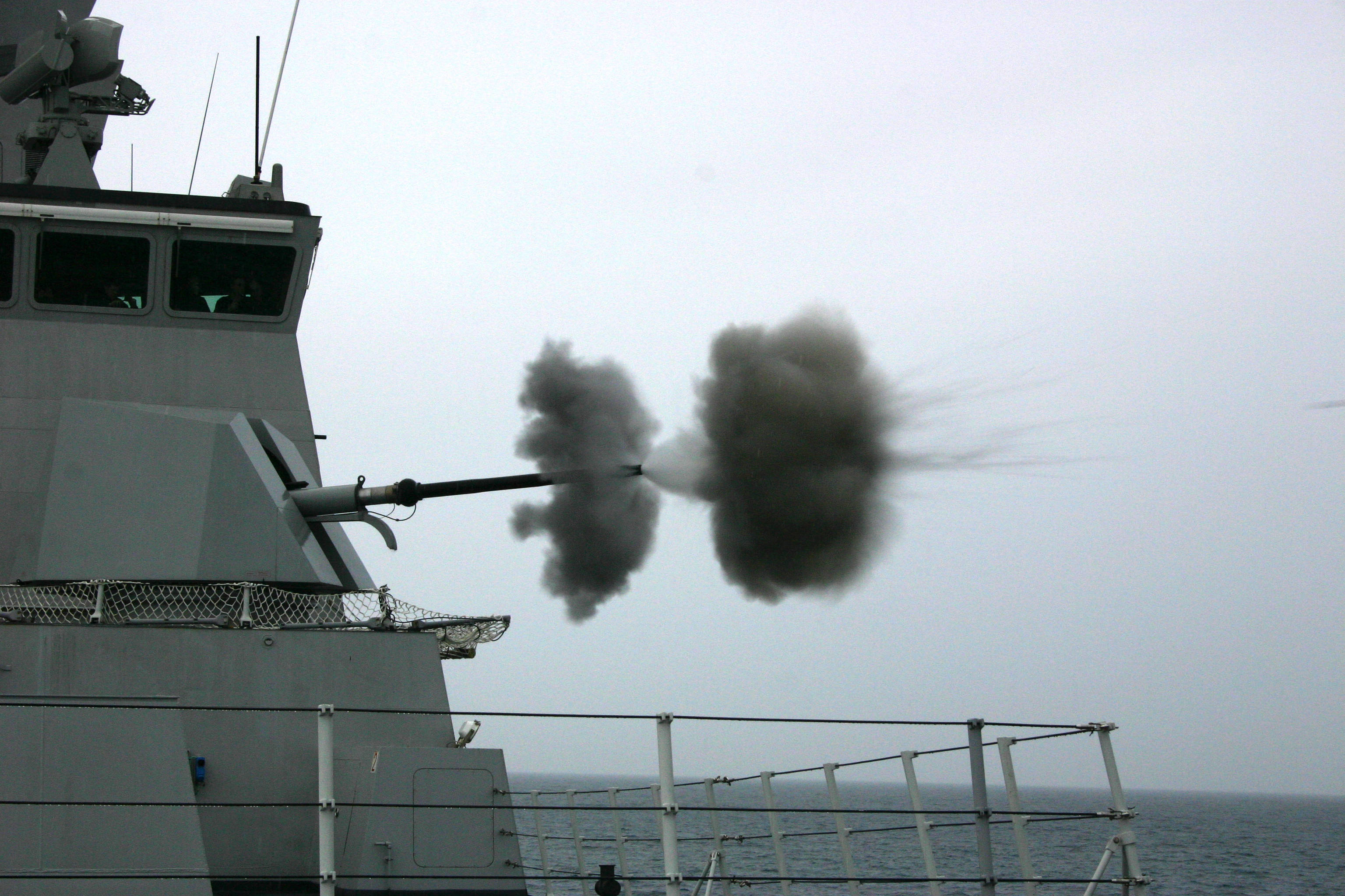 Caio Duilio (D 554)